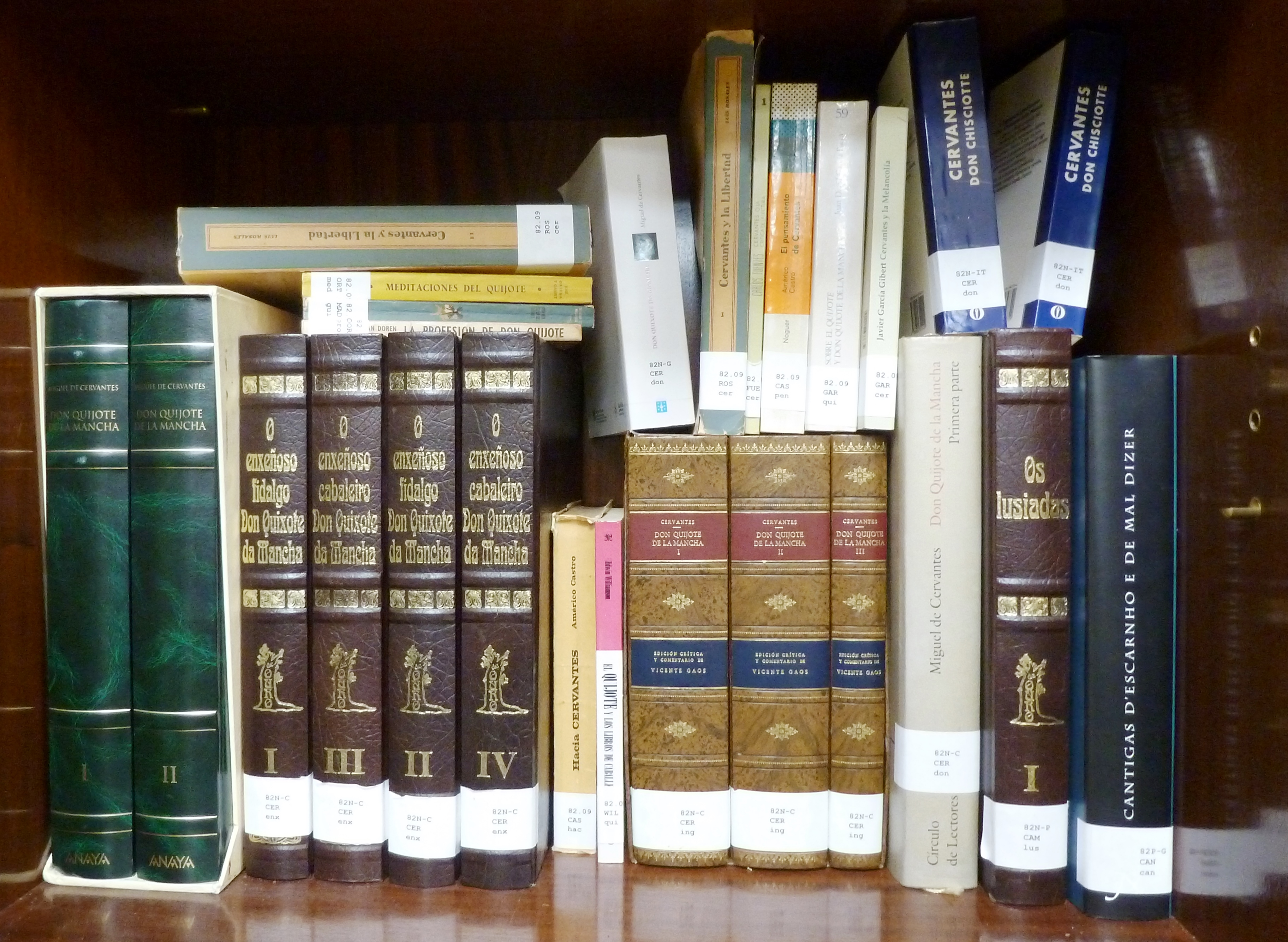 Detalle dos libros da doazón de María Victoria Moreno ao IES Torrente Ballester